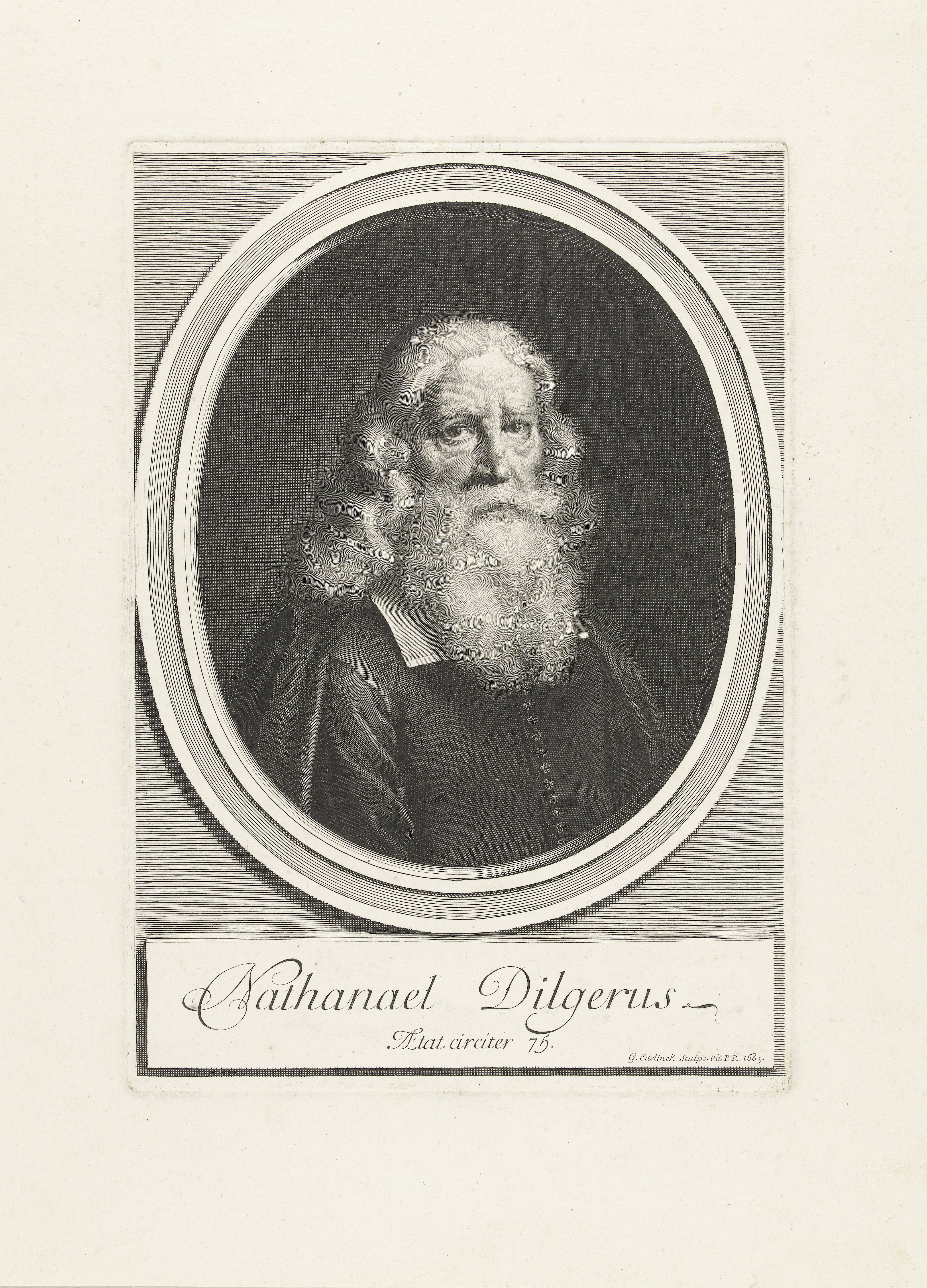 IdentificatieTitel(s): Portret van Nathanael DilgerNathanael Dilgerus (titel op object)Objecttype: prent Objectnummer: RP-P-BI-7491Catalogusreferentie: Robert-Dumesnil 185Opschriften / Merken: verzamelaarsmerk, verso, gestempeld: Lugt 240Omschrijving: Busteportret van Nathanael Dilger (1604-1679), pastoor en minister in Danzig, afgebeeld op 75-jarige leeftijd, in ovale omlijsting.VervaardigingVervaardiger: prentmaker: Gerard Edelinck (vermeld op object)verlener van privilege: Lodewijk XIV (koning van Frankrijk) (vermeld op object)Plaats vervaardiging: prentmaker: Parijsverlener van privilege: FrankrijkDatering: 1683Fysieke kenmerken: gravureMateriaal: papier Techniek: graveren (drukprocedé)Afmetingen: plaatrand: h 315 mm × b 221 mmOnderwerpWie: Nathanael DilgerVerwerving en rechtenVerwerving: overdracht van beheer 1816Copyright: Publiek domein